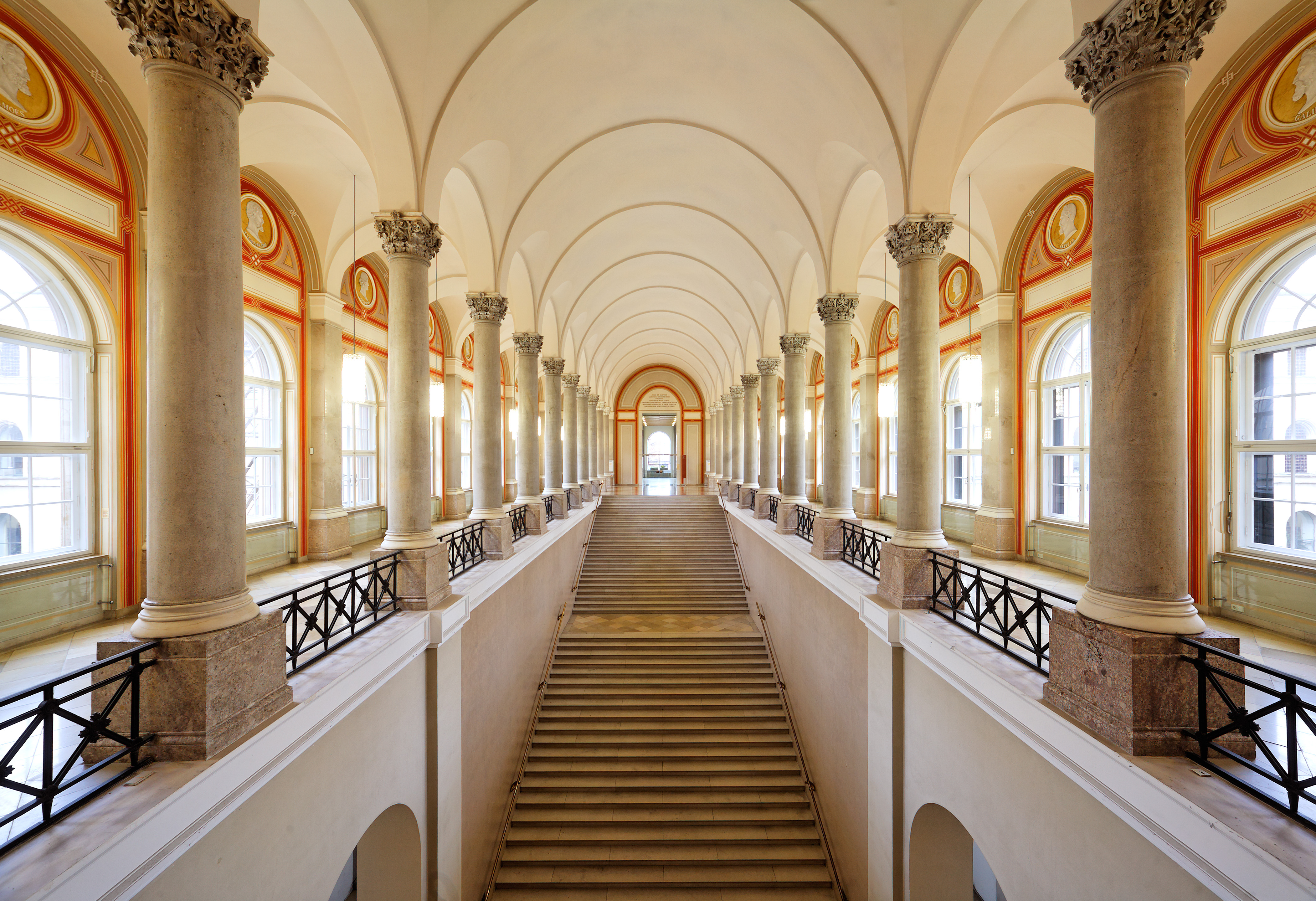 Treppenhaus nach der Restaurierung 2007